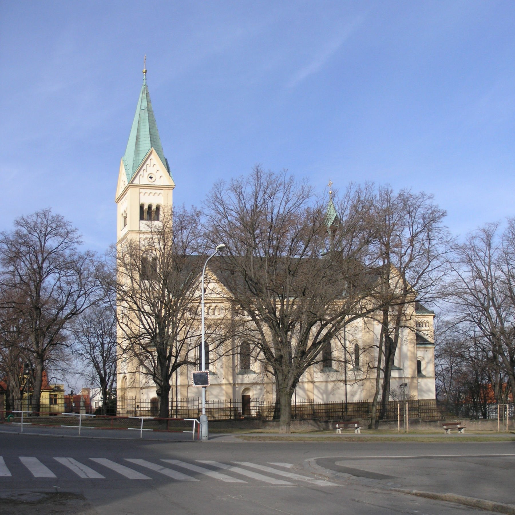 Praha, Střešovice - kostel svatého Norberta